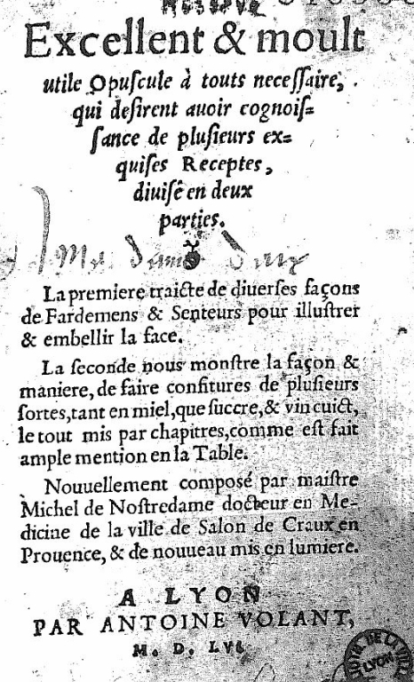 Michel de Nostredame, Excellent et moult utile opuscule, 1556 ed., title page